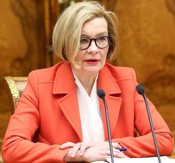 Паула Синикка Рисикко (род.1960) — финский политический деятель